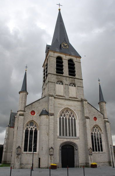 Onze-Lieve-Vrouwkerk, Melsele